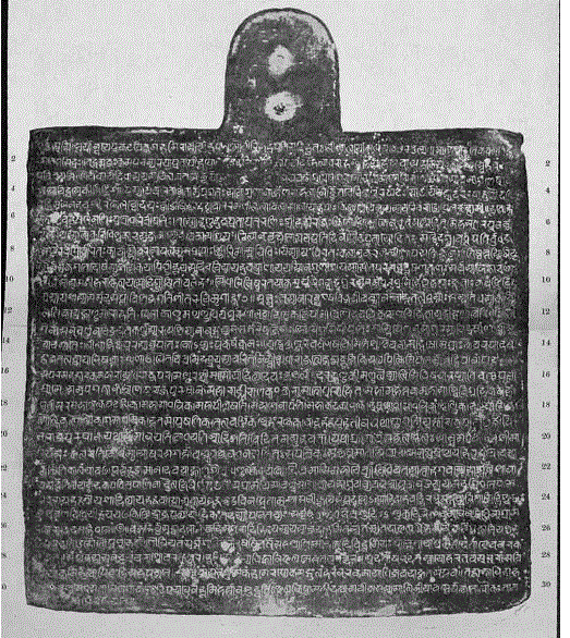 1020 ईस्वी कालीन बगहा से प्राप्त सूर्यादित्य ताम्रपत्र लेख